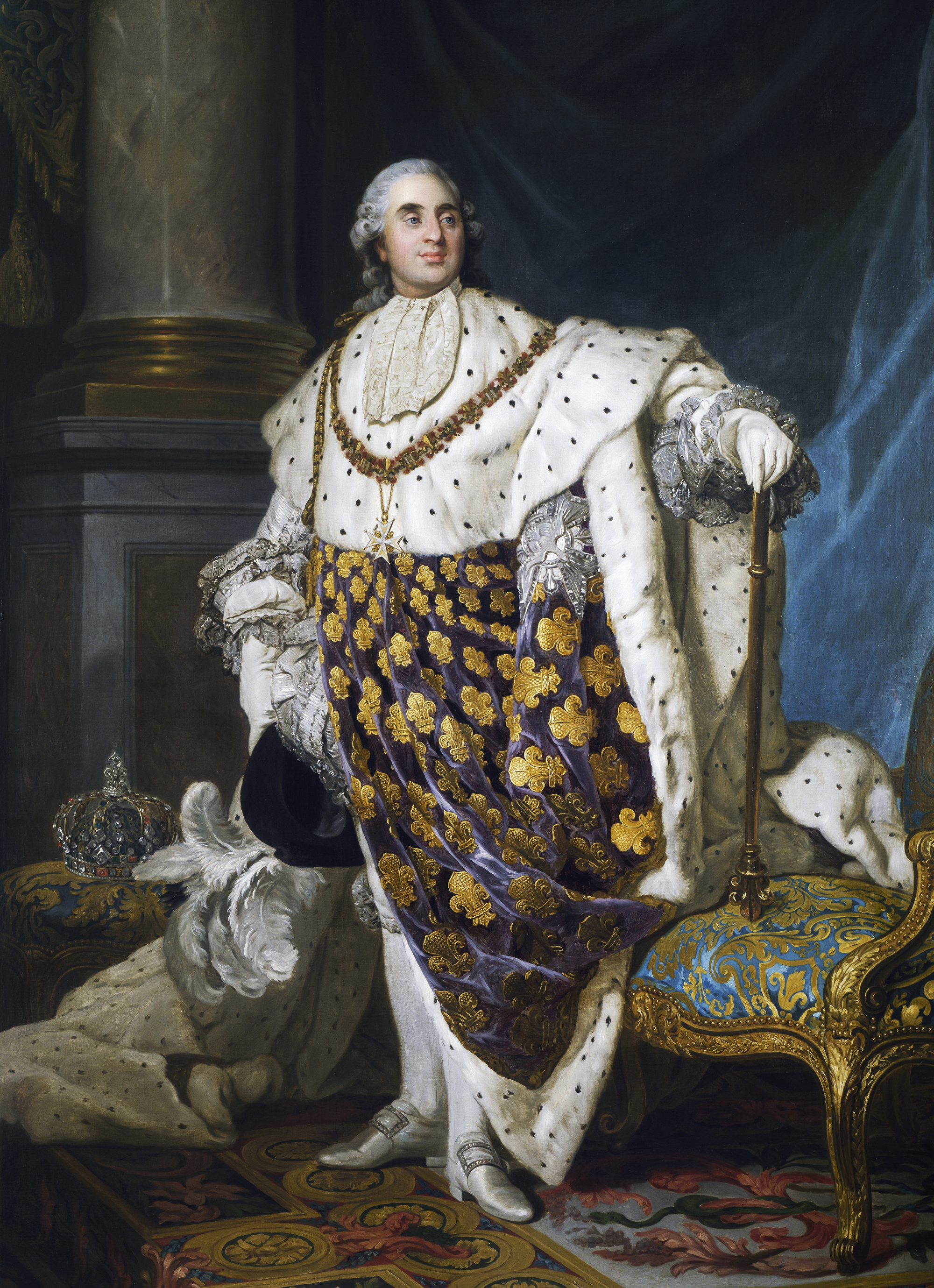 Portrait de couronnement de Louis le Seizième, Roi de France et de Navarre, par Joseph-Siffred Duplessis (1777)